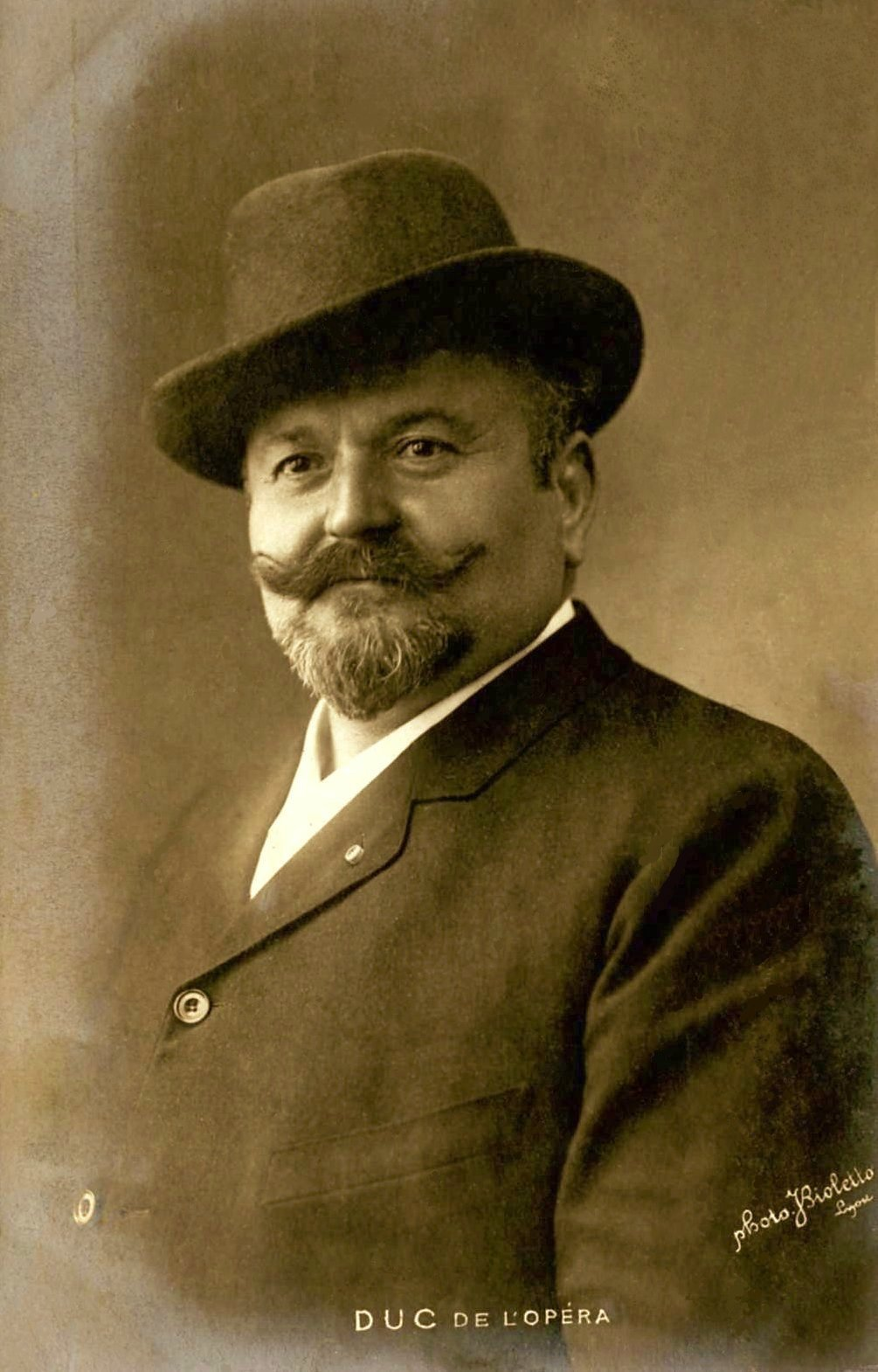 Portrait de Valentin Duc par J. Bioletto (photographe installé 12 rue du Bat d'Argent à Lyon en 1901-1902.